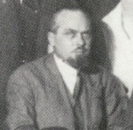 Erste Konferenz der OSA, 1928.